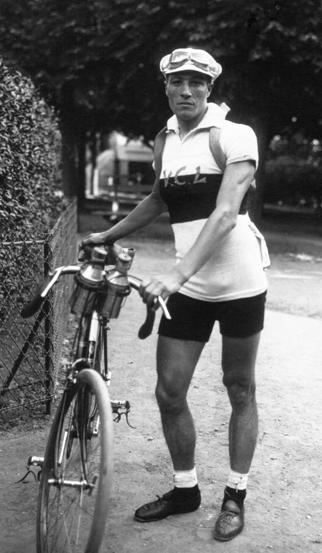 Circuit de Paris : Detreille : portrait à 3 m : [photographie de presse] / Agence Meurisse